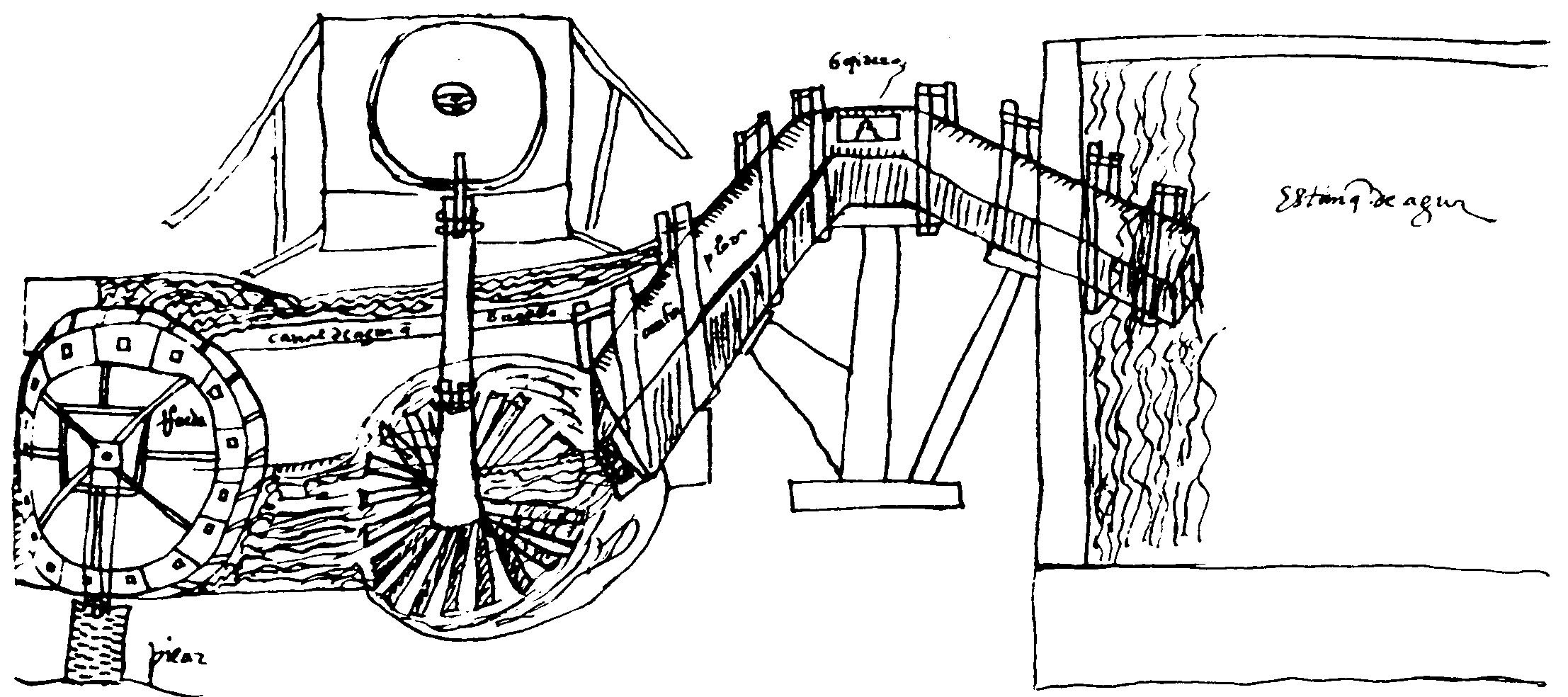 Molino de sifón diseñado por Francisco Lobato y Gómez Pereira en Medina del Campo en 1558 y patentado en 1563. Texto original de la figura: El licenciado Perea la hizo año 1558 años. Henchidero. Cantimplora. Canal de agua que vuelve. Estanque de agua. Rueda. Pilar.